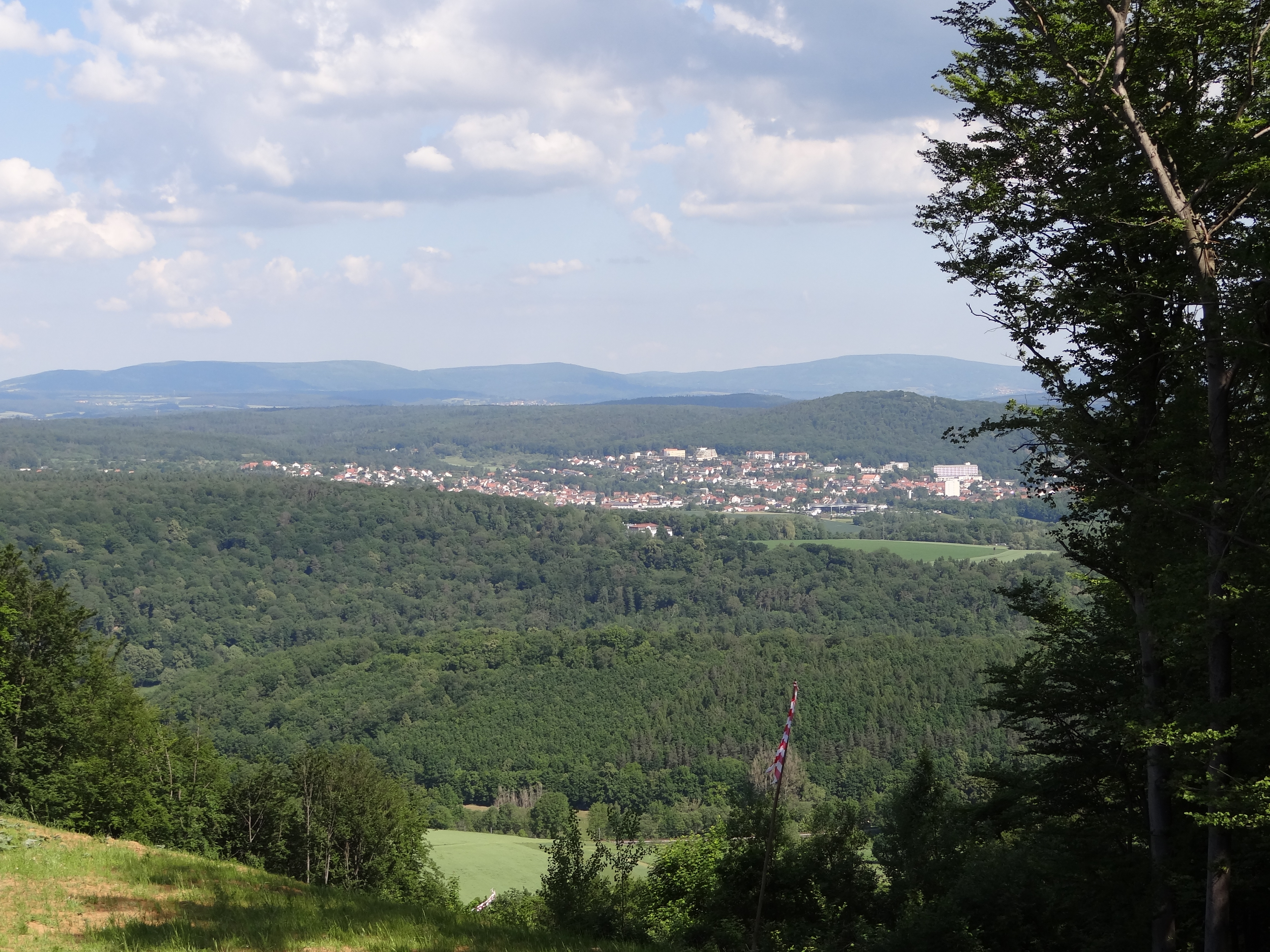 97688 Bad Kissingen, Germany